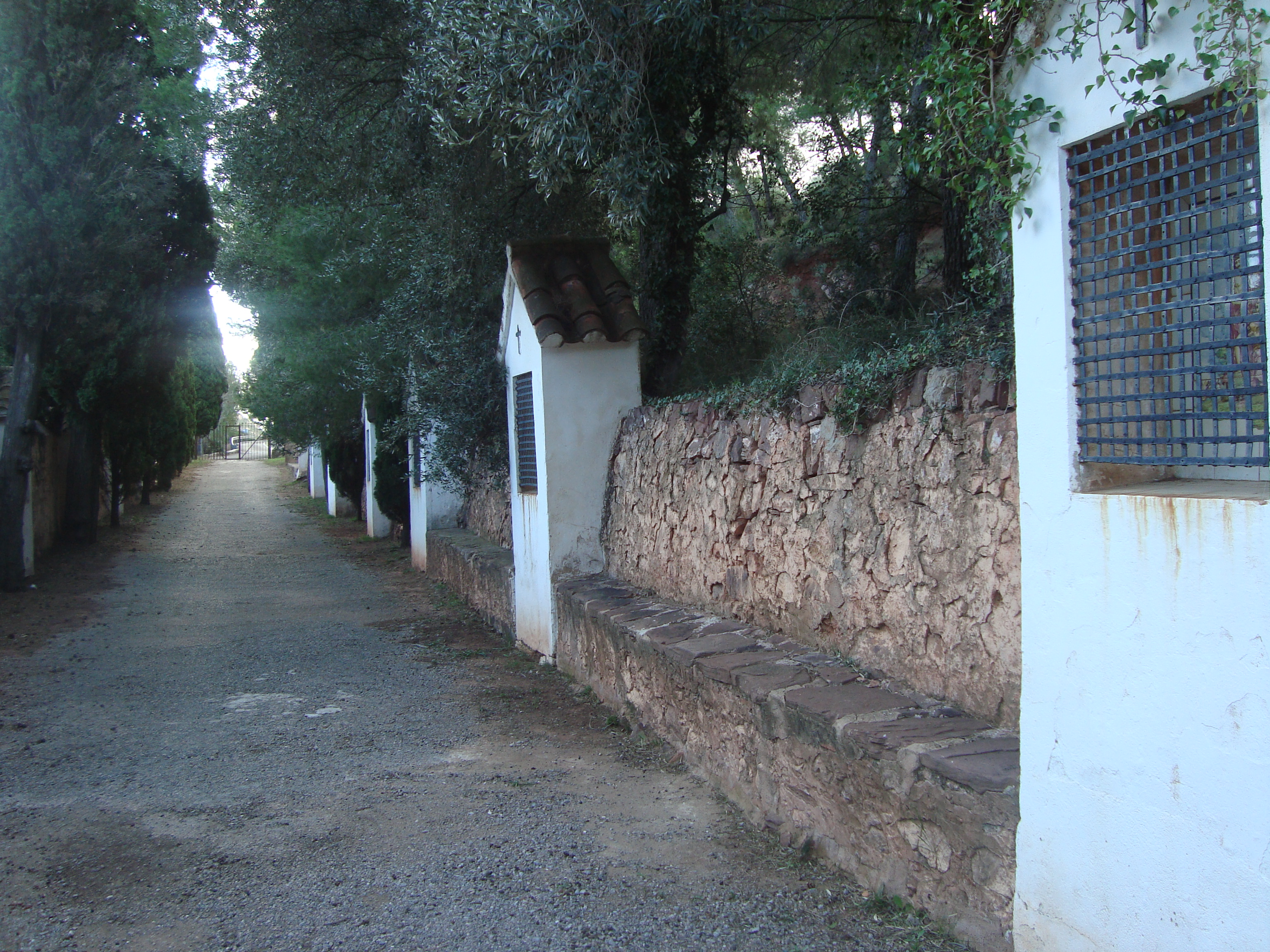 Calvari del Convent Nou (Benicàssim)